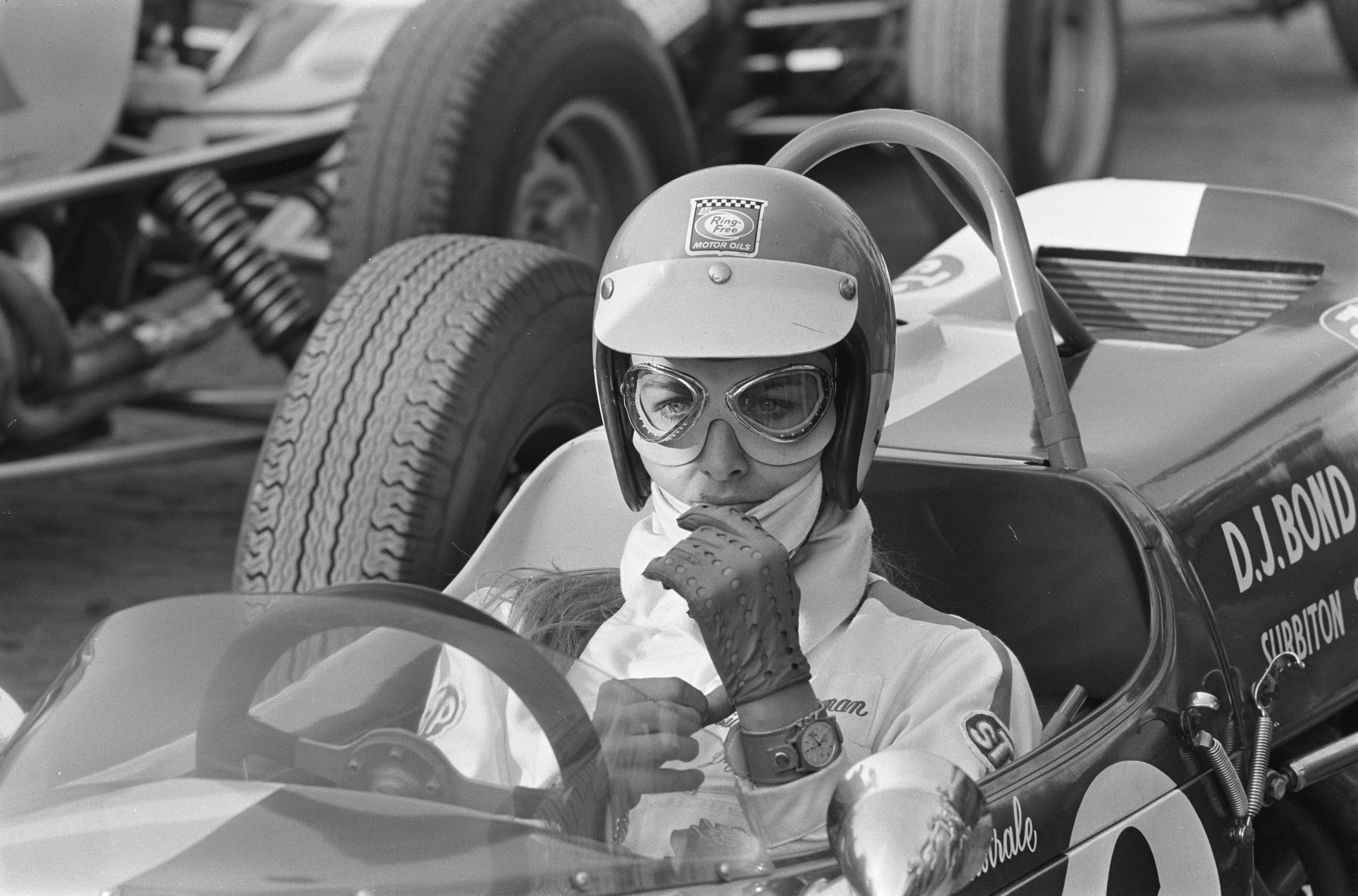 Liane Engeman bij de autoraces op Circuit Zandvoort